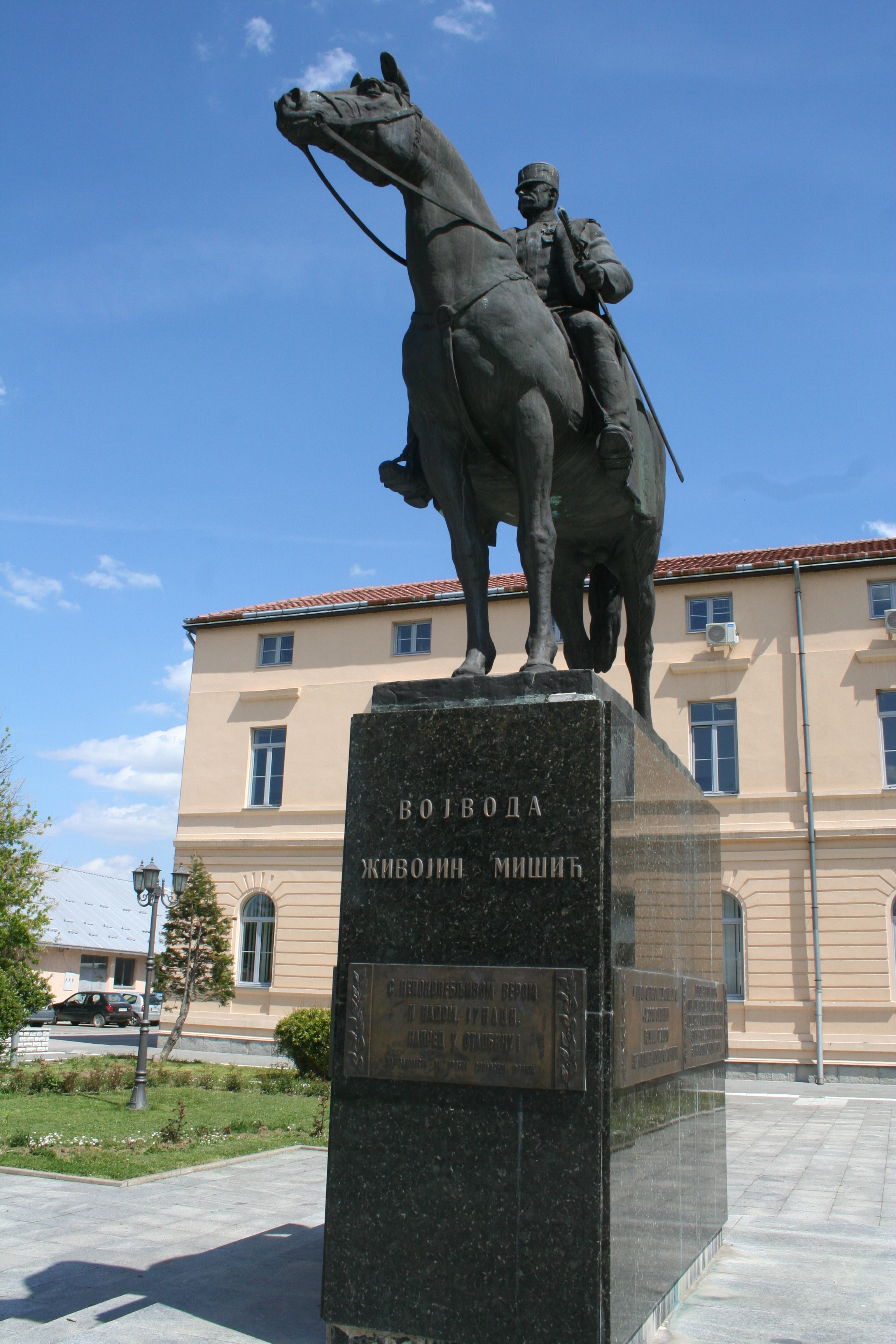 Mionica i spomenici u njoj